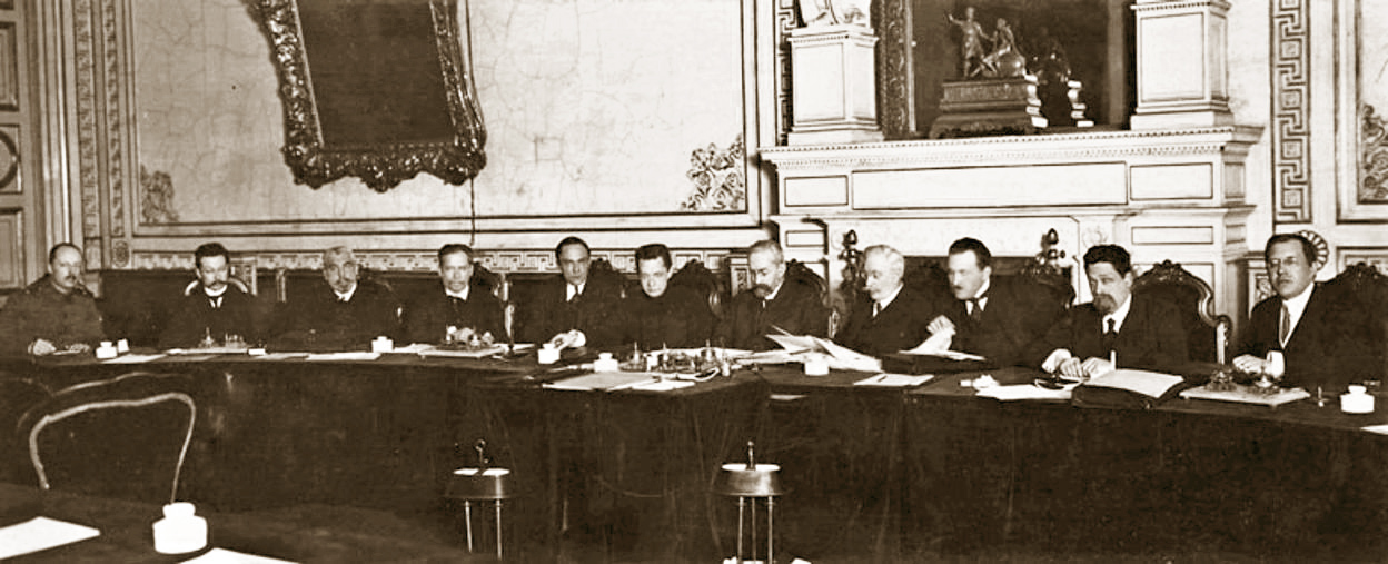 Riunione del Governo provvisorio russo